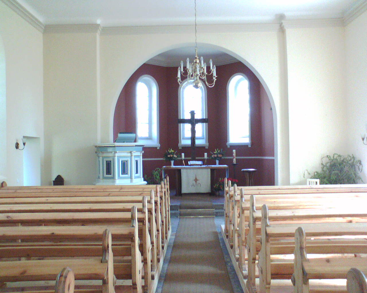 Dorfkirche Bohnsdorf, Innenraum mit Blick auf Altar